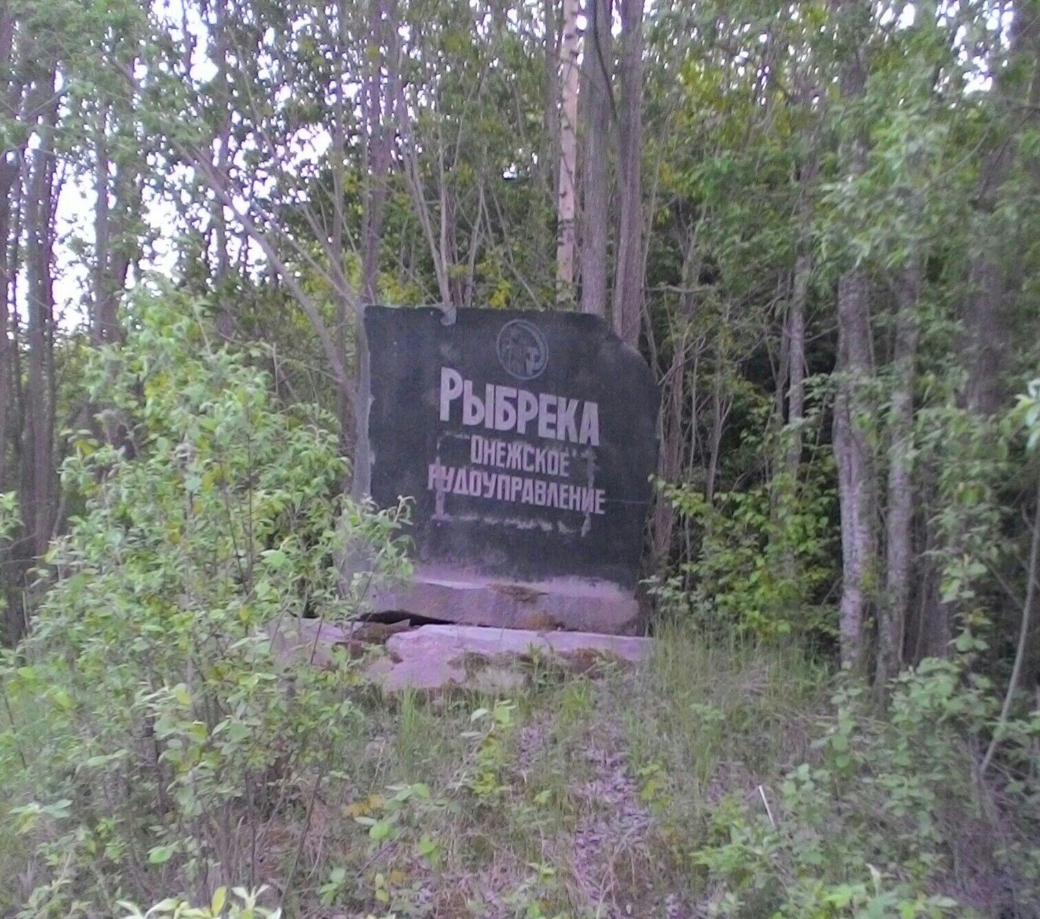 Монумент